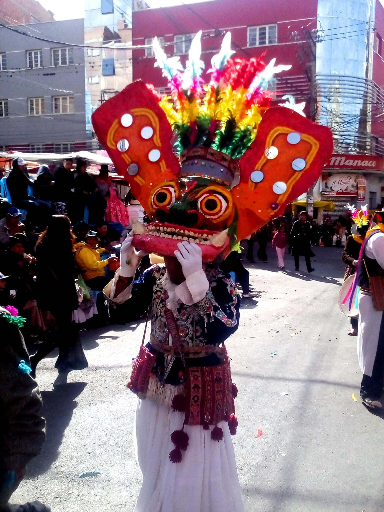 La Paz Bolivia 2017